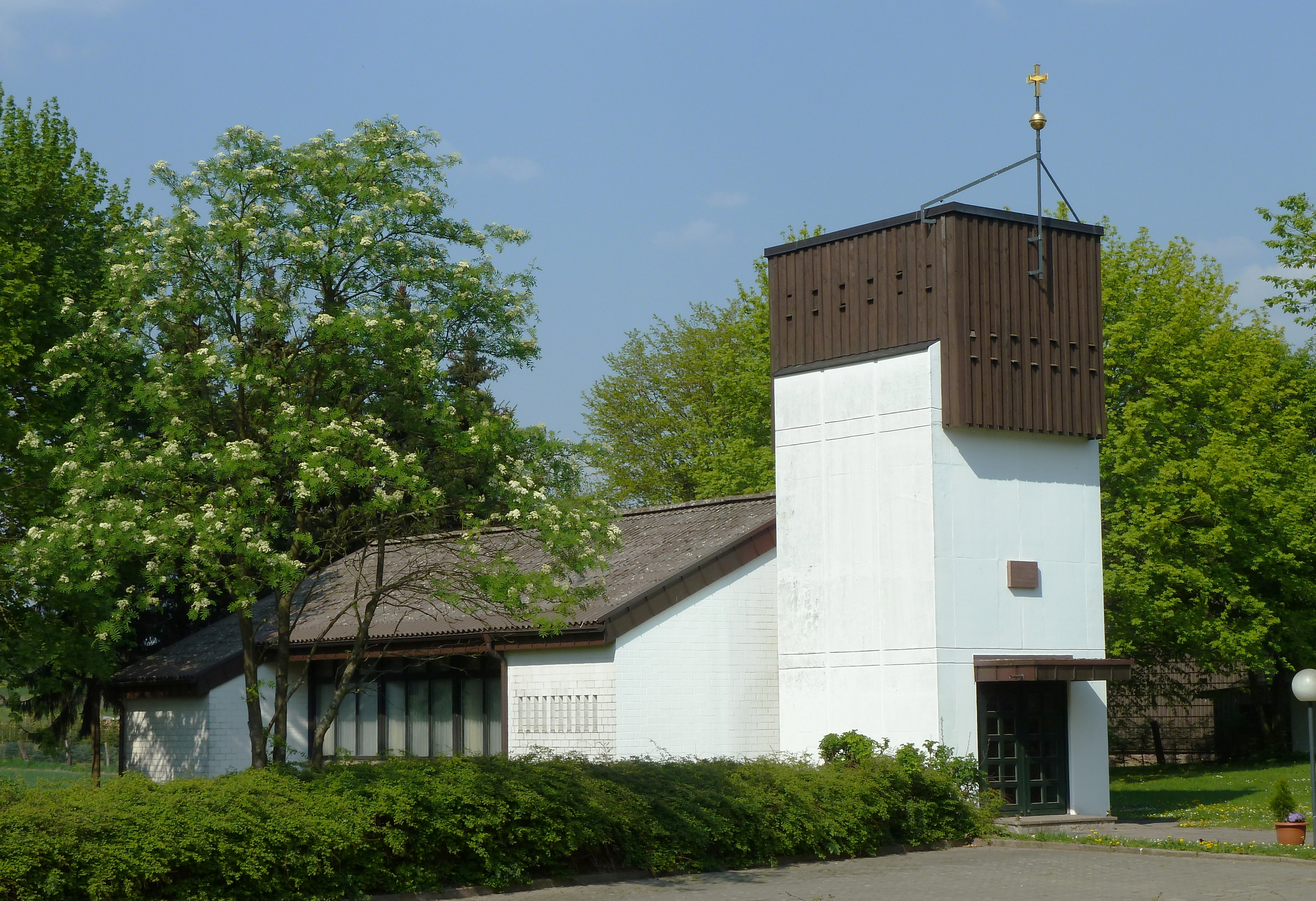 Ev.-luth. Kirche in Arholzen, Landkreis Holzminden, Niedersachsen. Erbaut 1980